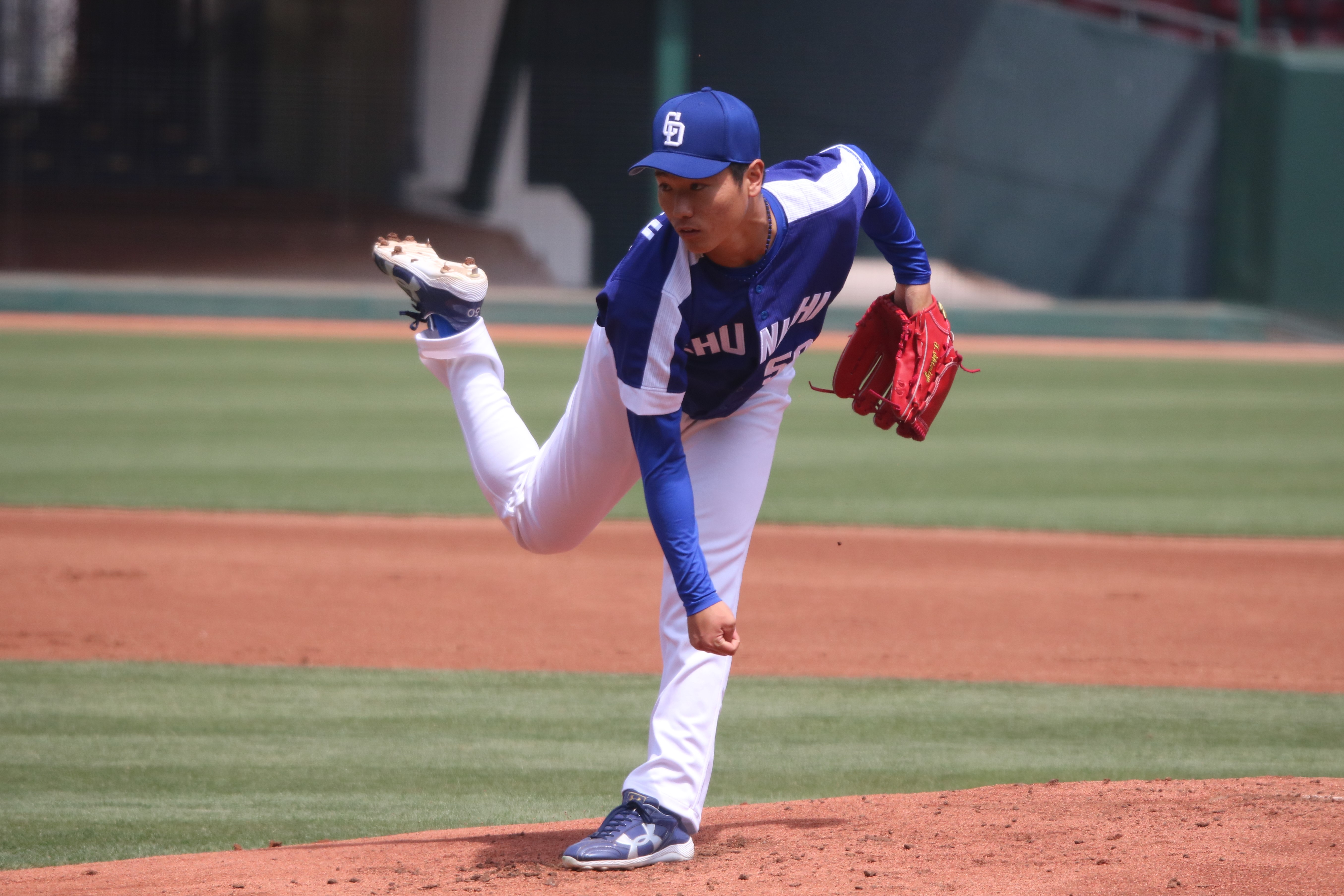 2018/4/13 ウエスタンリーグ(対広島戦)